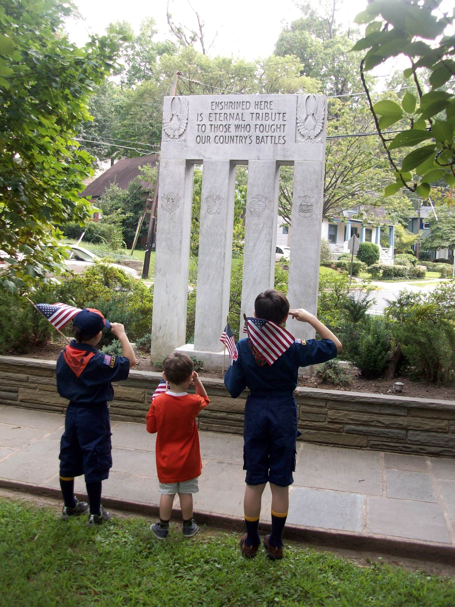 Memorial Day in Takoma Park